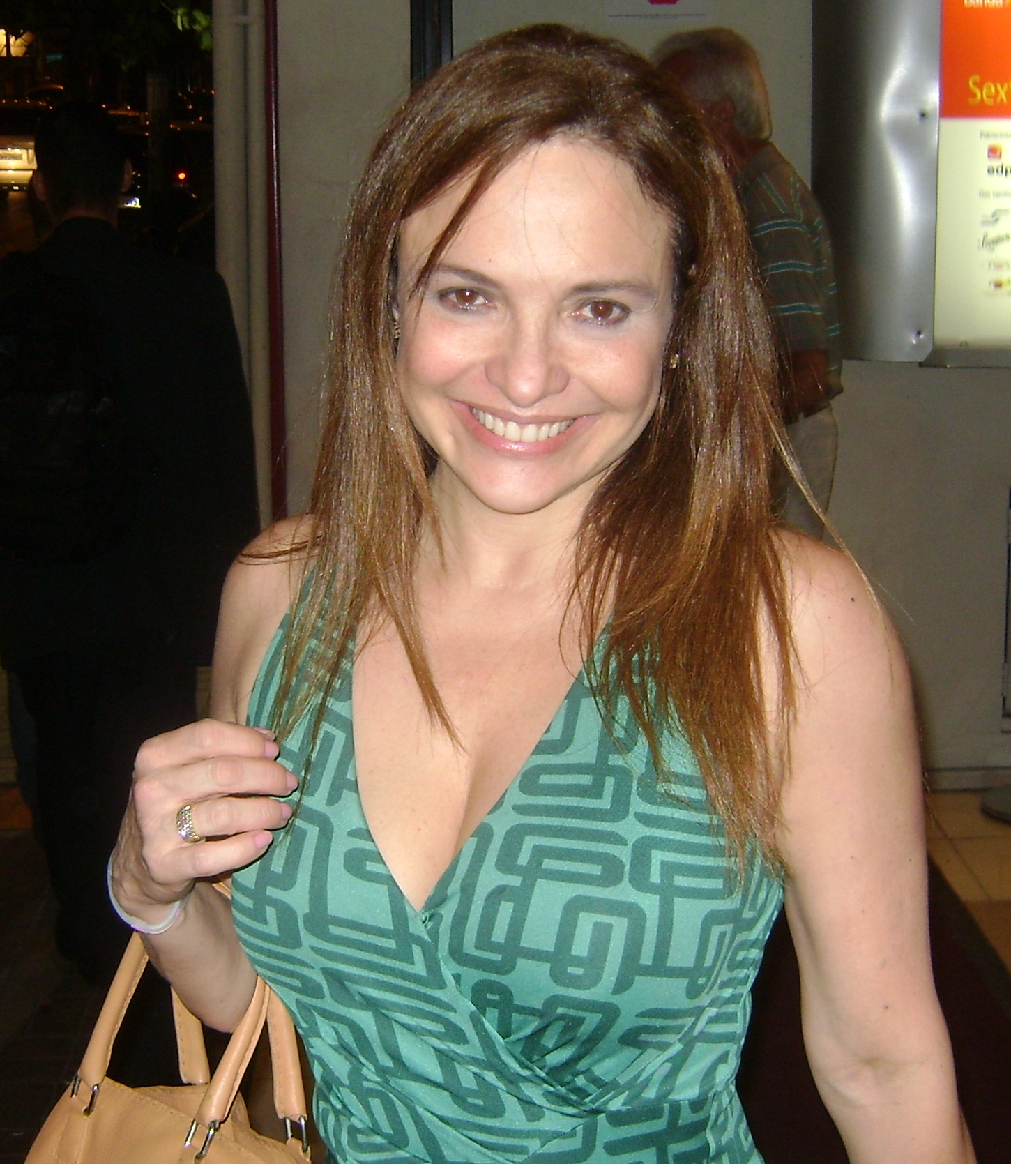 Luíza Tomé, atriz brasileira, após a apresentação da peça "Mulheres Alteradas", em São Paulo.